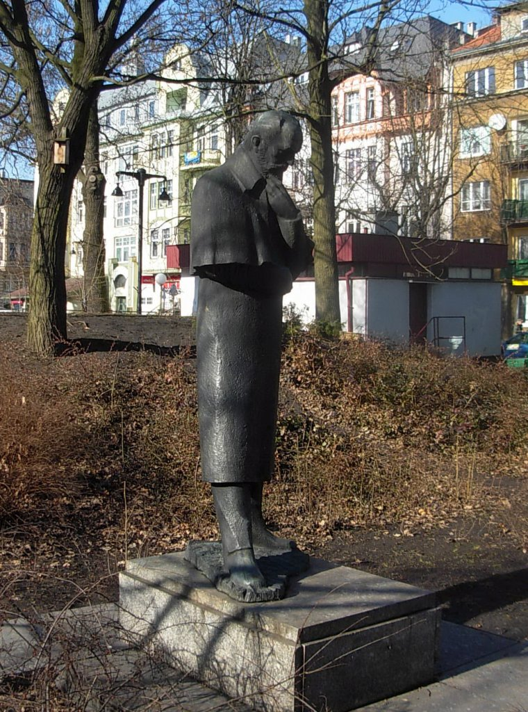 Galeria pomników kompozytorów i wirtuozów muzyki poważnej w Bydgoszczy - pomnik Piotra Czajkowskiego